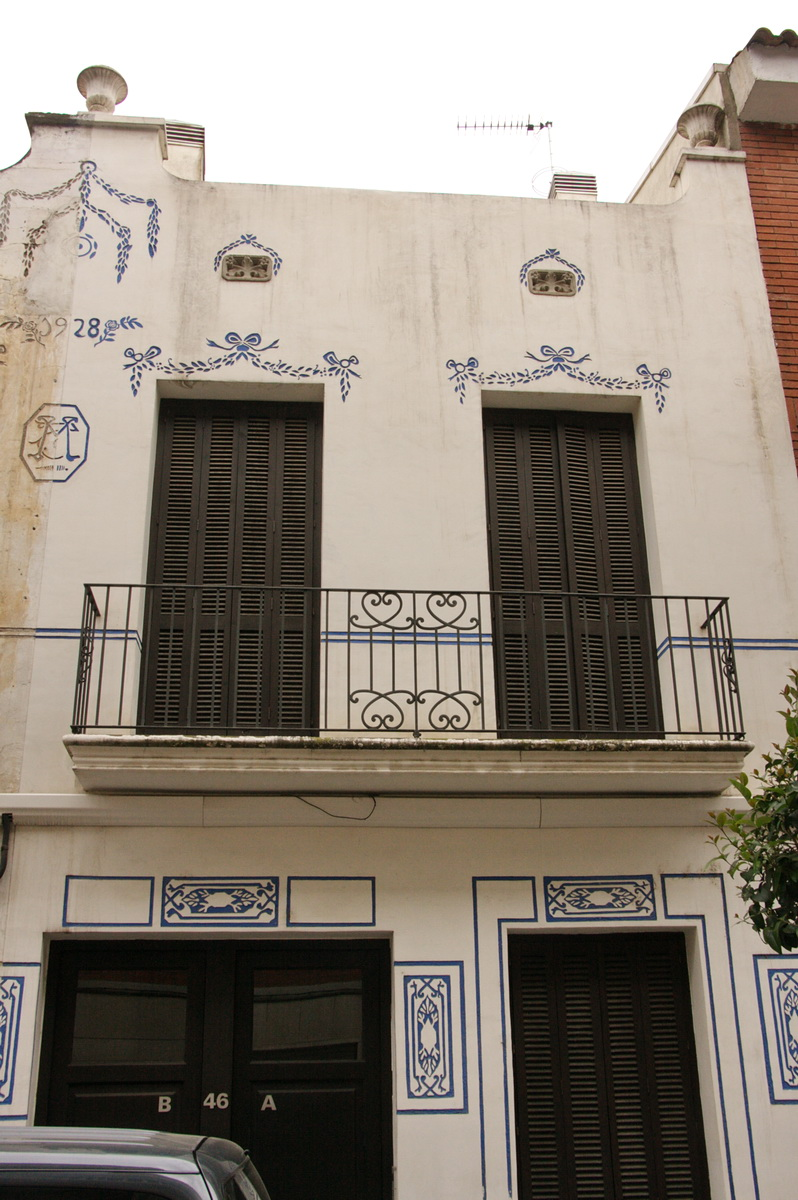 Casa Tapies a Sant Joan Despí al Baix Llobregat, Catalunya, obra de l'arquitecte modernista Josep Maria Jujol el 1927.